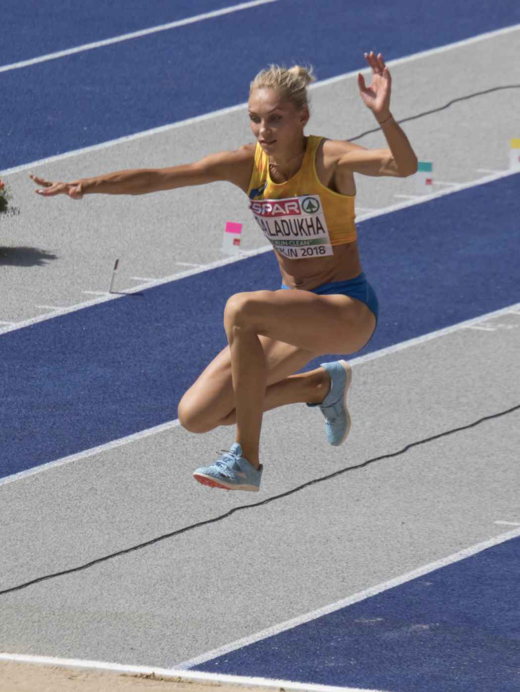 EKB21137 saladukha